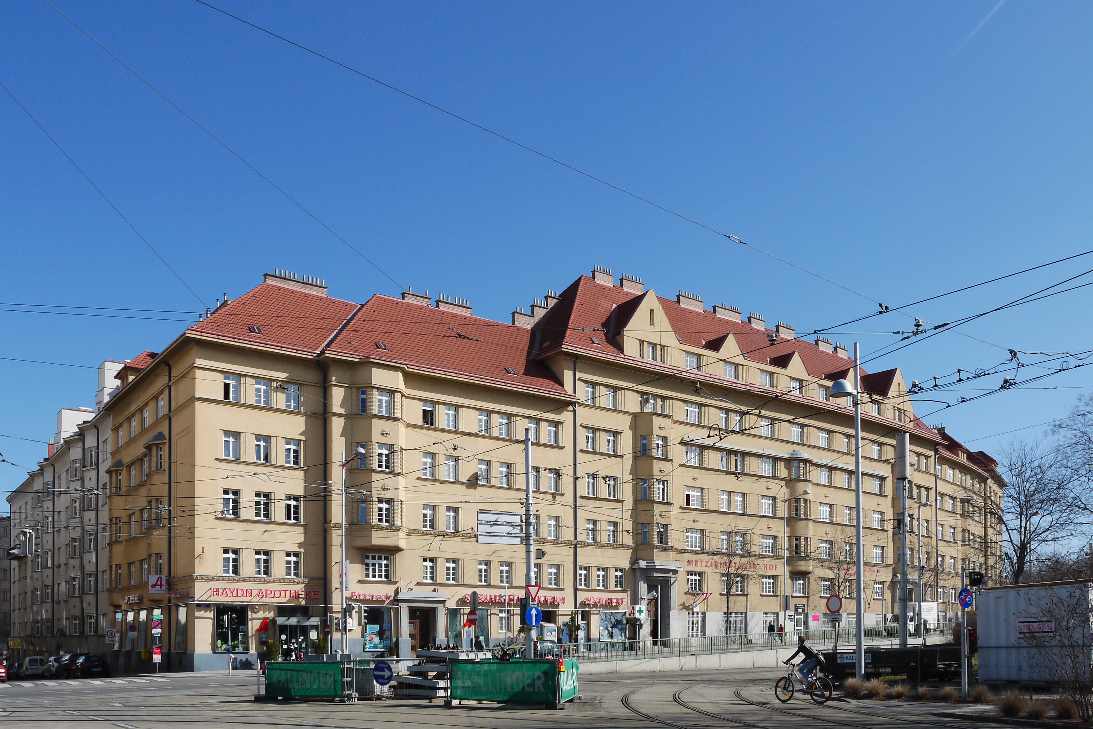 Metzleinstaler Hof